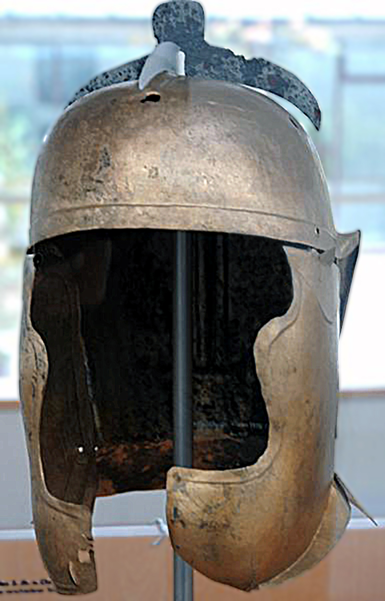 Das Kastell Buch, auch Kastell Rainau-Buch genannt, ist ein ehemaliger römischer Garnisonsort, der nahe am Rätischen Limes, einem UNESCO-Weltkulturerbe, zur Grenzsicherung errichtet wurde. Die Reste der Fortifikation liegen auf der Gemarkung des zur Gemeinde Rainau gehörenden Dorfes Buch im Ostalbkreis im östlichen Baden-Württemberg. Brunnen 9 barg auf der 10,5 Meter tiefen Sohle zusammen mit einer kleinen Holzplastik ein fast vollständiges Kettenhemd des 3. Jahrhunderts und daneben einen ausgezeichnet erhaltenen Bronzehelm vom Typ Niederbieber, der offensichtlich als Halbfabrikat in den Boden kam.